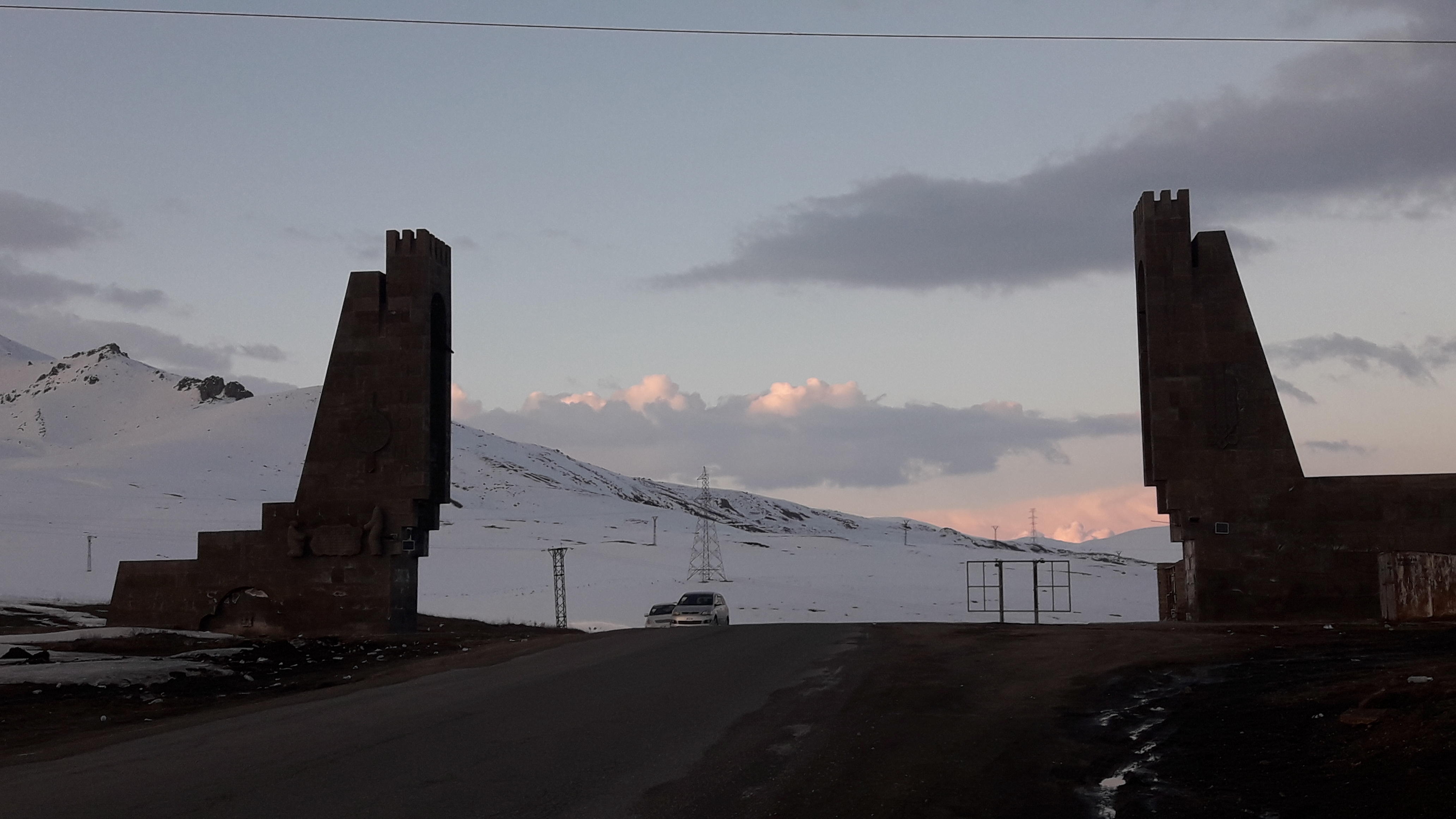 «Զանգեզուրի դարպասներ» հուշարձան, գտնվում է Գորայք գյուղից արևմուտք: 28/3